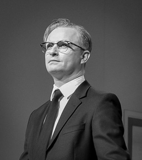 Kung Lear handlar om en makthavare som tappat greppet och hemfaller åt sin fåfänga. Rollen som Kung Lear är Sven Wollters avsked till teatern.